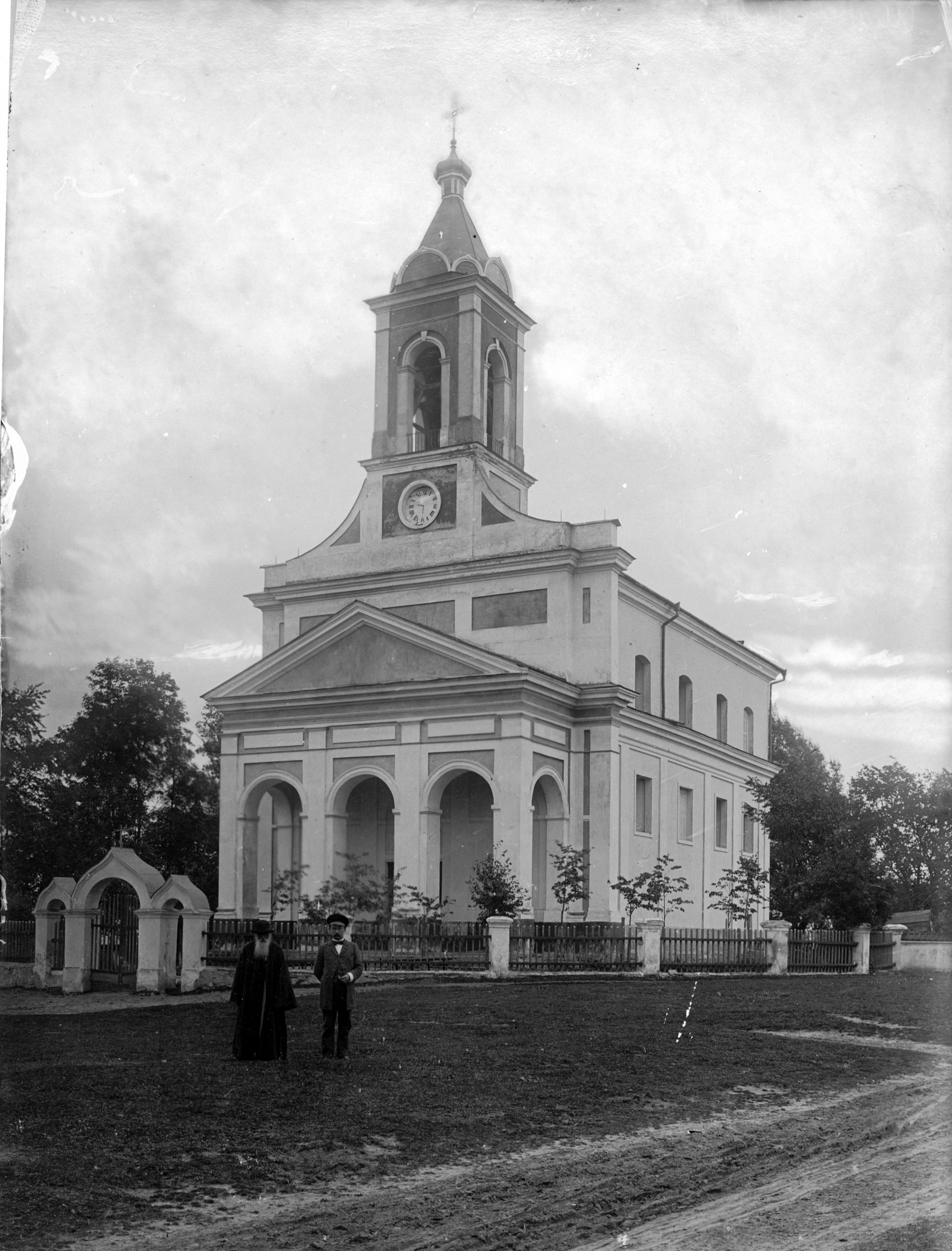 Беларуская (тарашкевіца): Шчорсы (Ščorsy). Царква Зьмітра Салунскага па маскоўскай перабудове